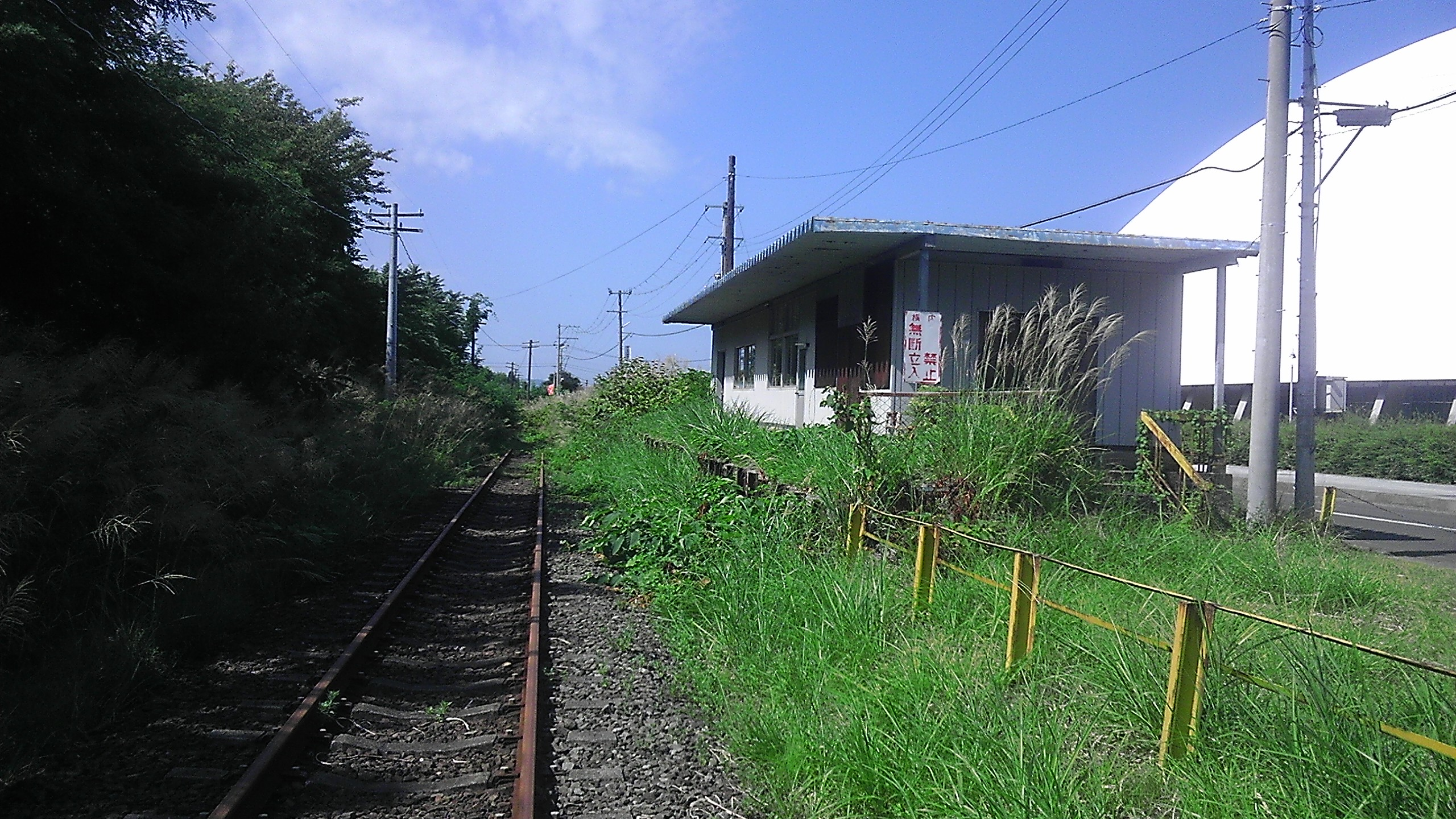 小坂鉄道線の岱野駅跡地です。